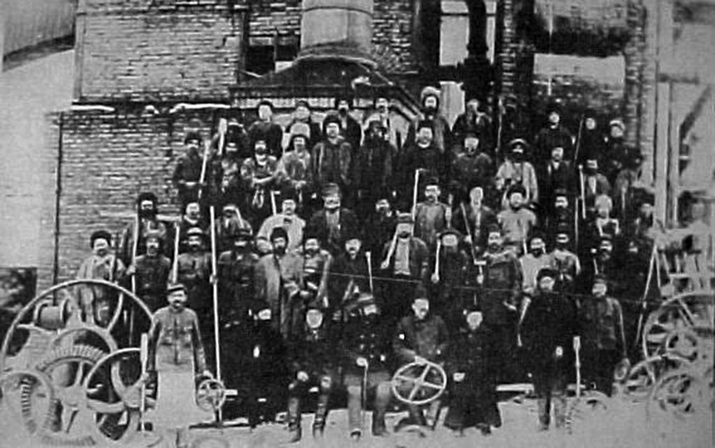 A govasdiai vasgyár munkásai, Vajdahunyad, Románia